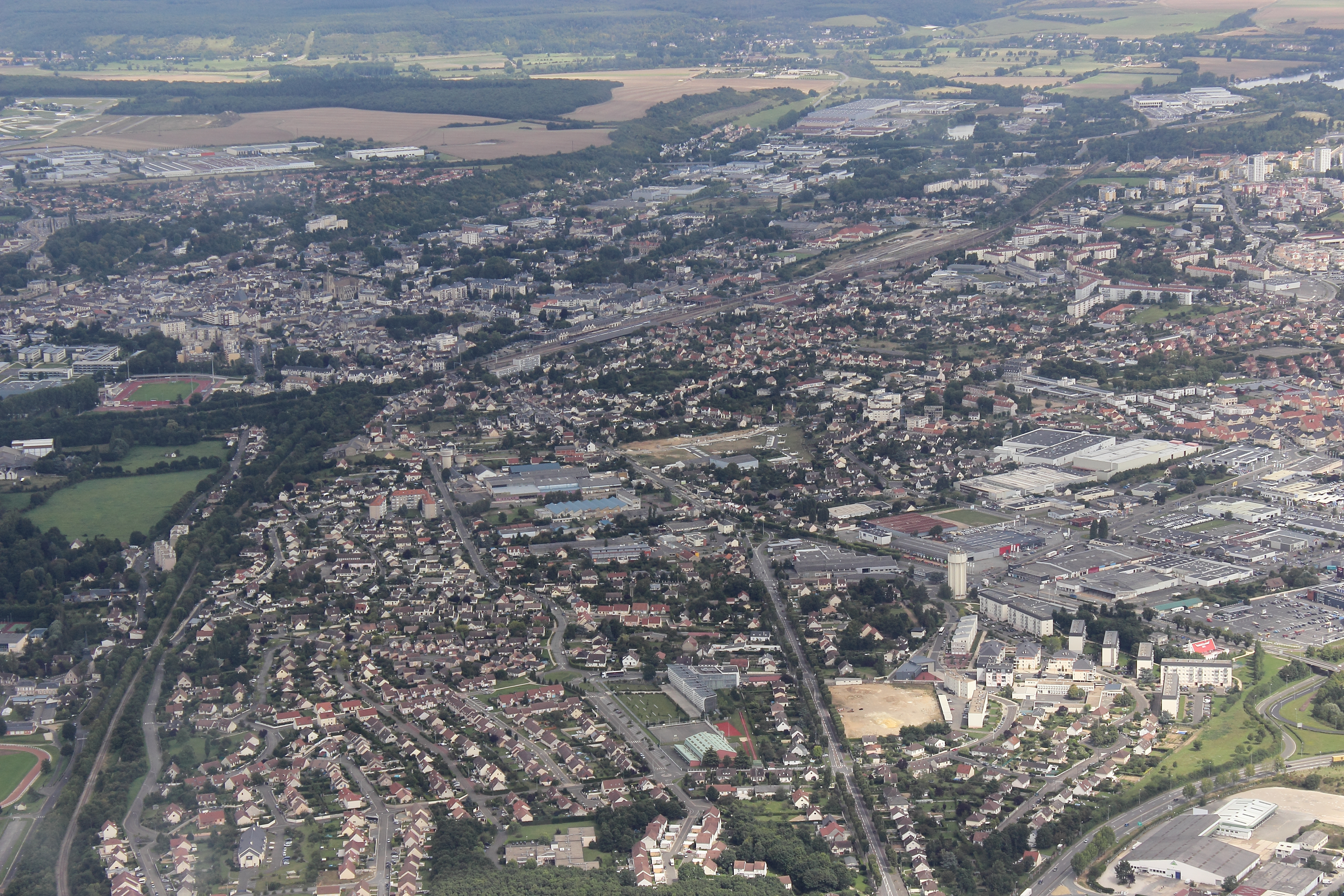 Vue aérienne de Vernouillet et du Sud-Ouest de Dreux